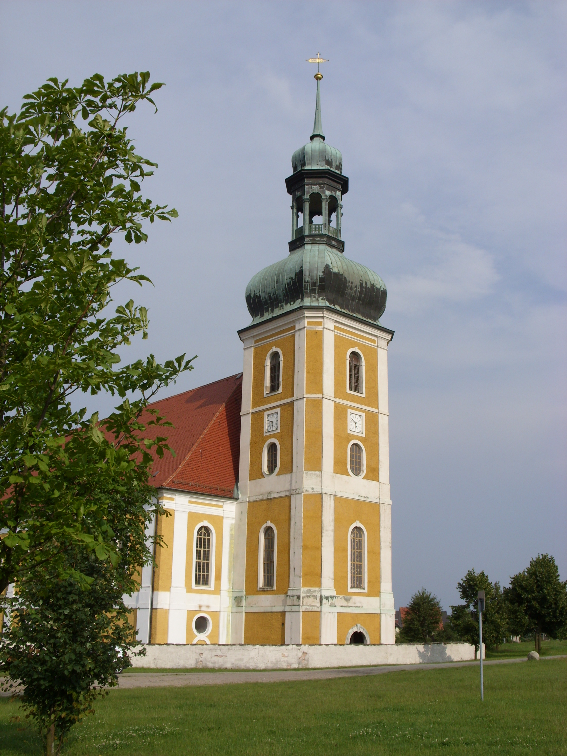 Wallfahrtskirche in Rosenthal, Landkreis Bautzen. Hornjoserbsce: Putnikowanska cyrkej w Róžeńće.